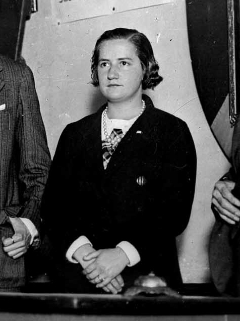 ALCANCE Y CONTENIDO: Batzoki de la calle Bidebarrieta; el primer batzoki, fundado en 1907, estuvo en la calle María Angela. De pie, Manuel de Eguileor, diputado del Partido Nacionalista Vasco, acompañado de Mercedes Careaga y del bertsolari Urretxindorra (Kepa Enbeita) en un acto para promover la suscripción de acciones para la compra del edificio nº 11 de la calle María Angela, donde estuvo el tercer batzoki desde finales de 1933; sentados, Pachi Ascasibar, Josefa Albizu y Crescencia Solozabal. Localización: Eibar